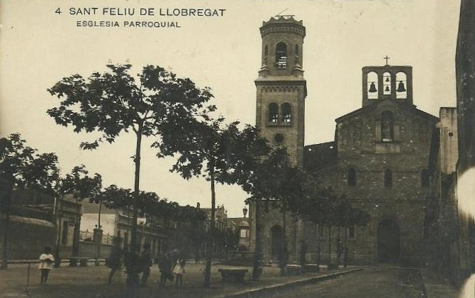 Iglesia parroquial San Feliu de Llobregat